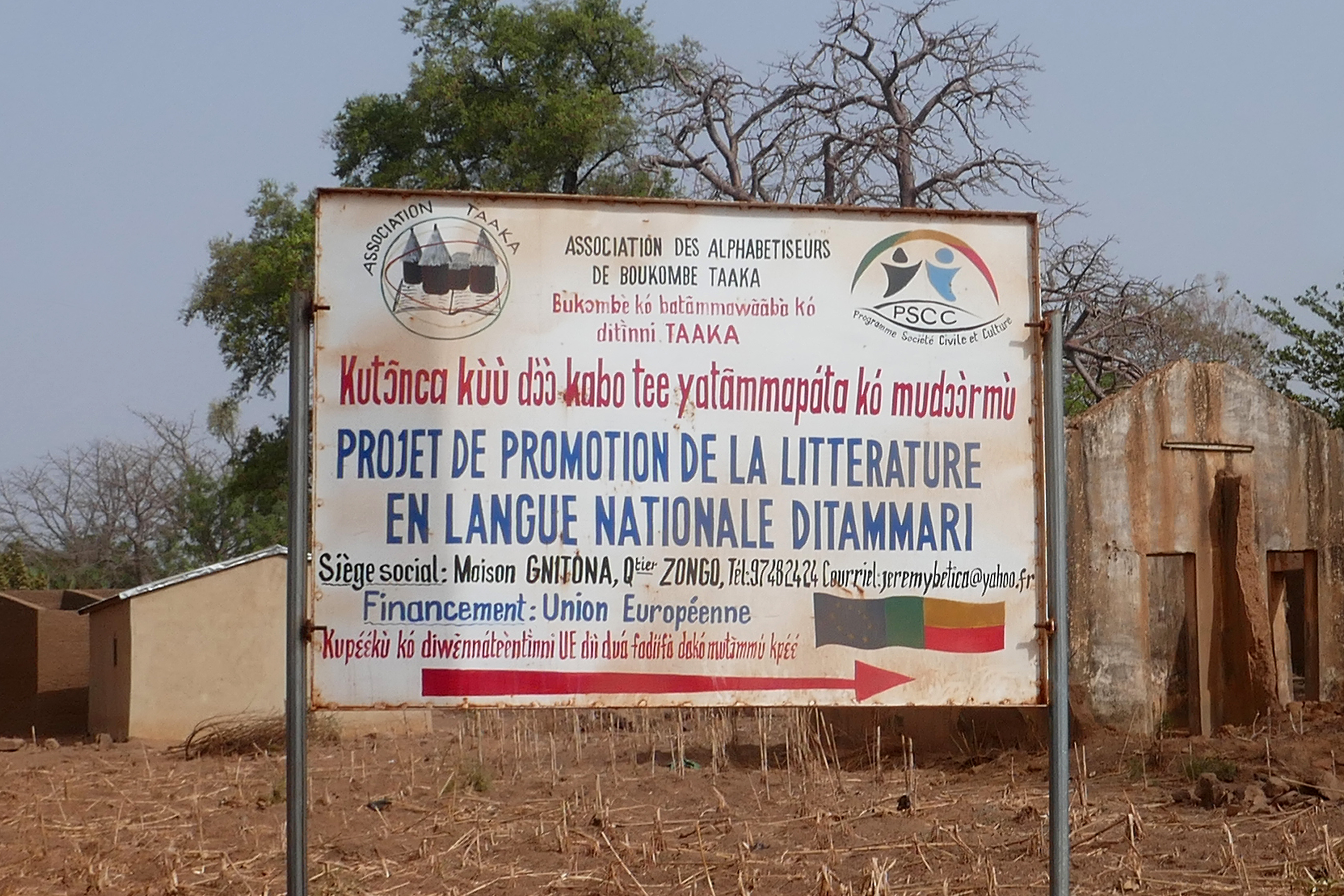 Bénin (Atakora) : Projet de promotion de la littérature en langue nationale ditammari.